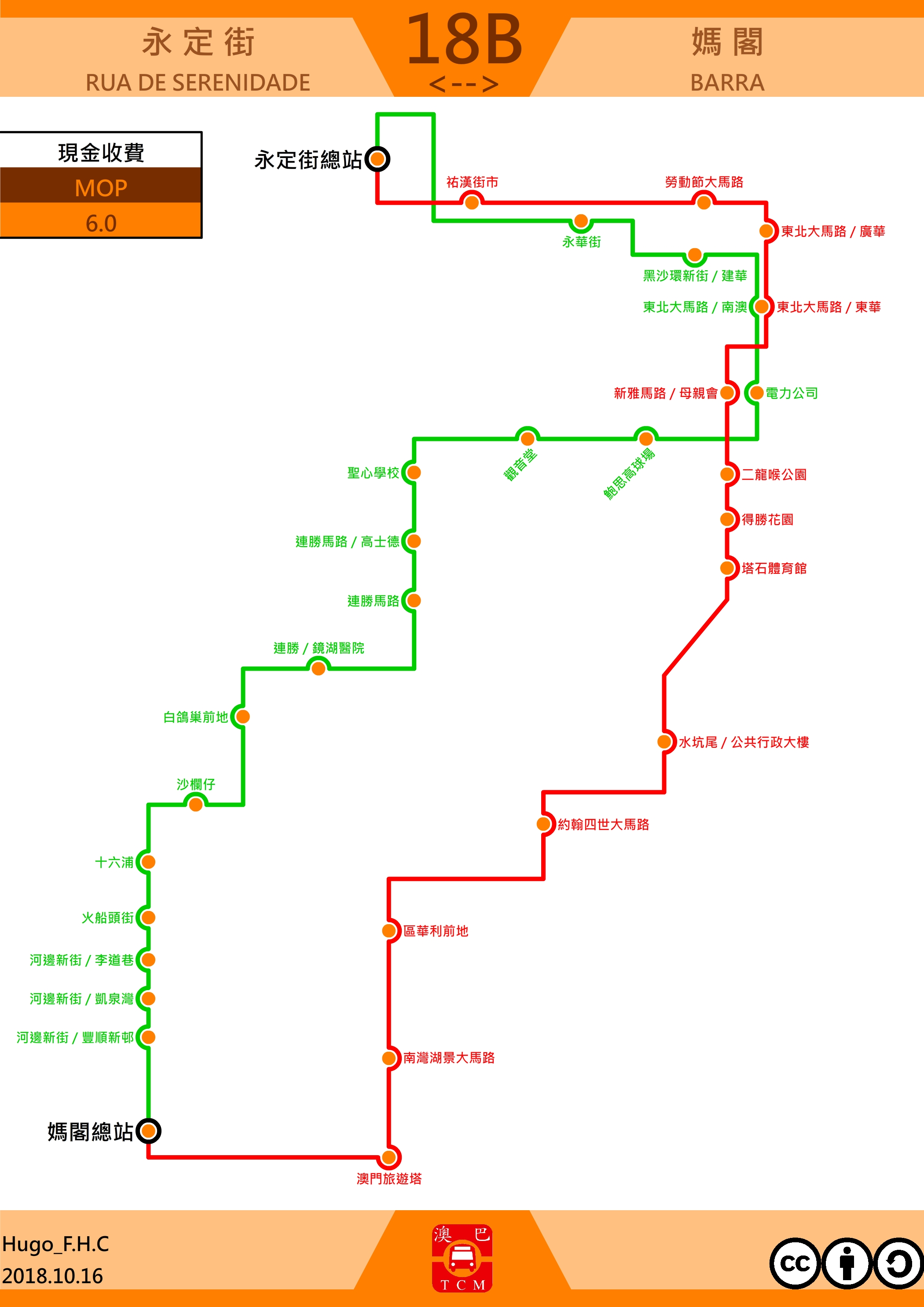 澳門巴士18B走線圖